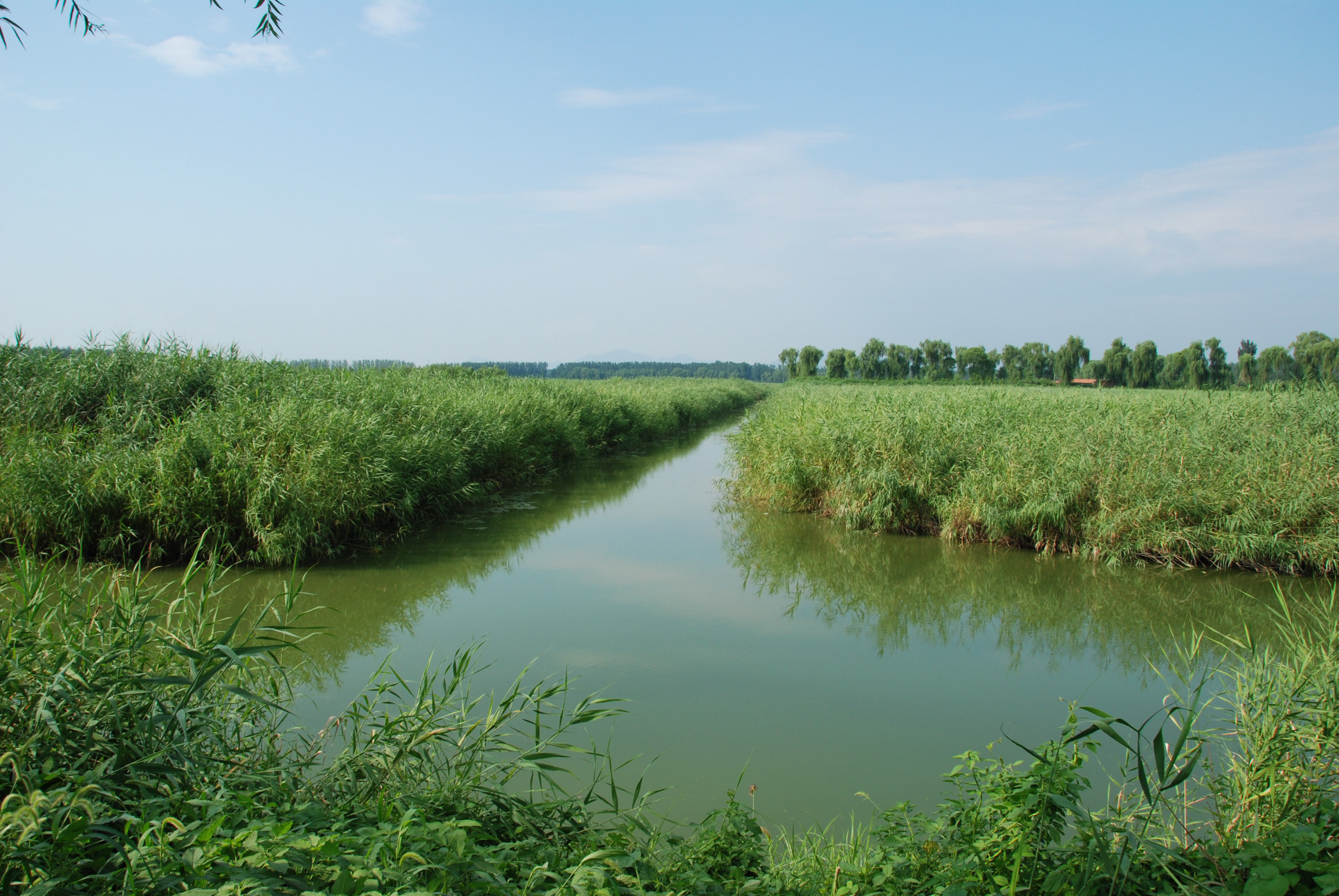 Shunyi, Beijing, China